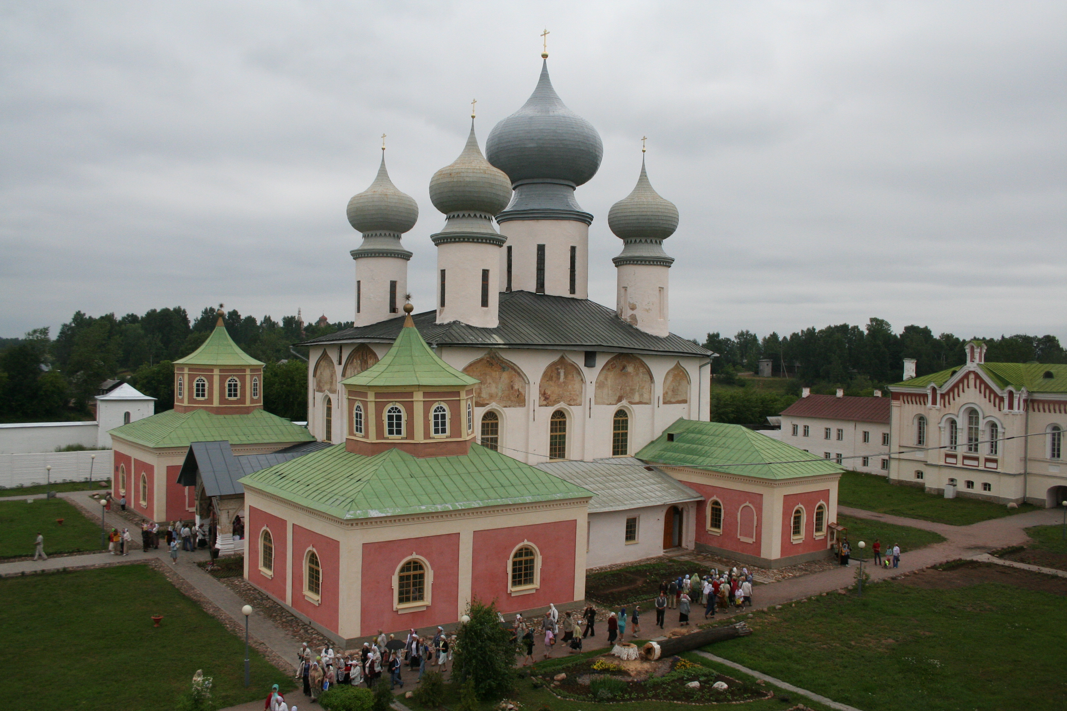 Тихвинский Успенский собор в Успенском монастыре. Tikhvin Cathedral of Dormition. Photo made on 2006-07-15 by Vladimir V. "Dr Bug" Medeyko